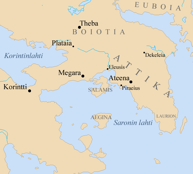 Attika Peloponnesolaissodan aikana. Tein kartan pohjan sivulla löytyvällä työkalulla. Saksankielisestä wikistä löytyy viesti, jonka mukaan tällä tehdyt kartat ovat PD.